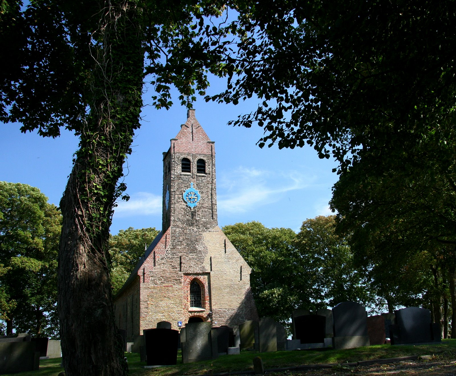 Kerkje in Hijum